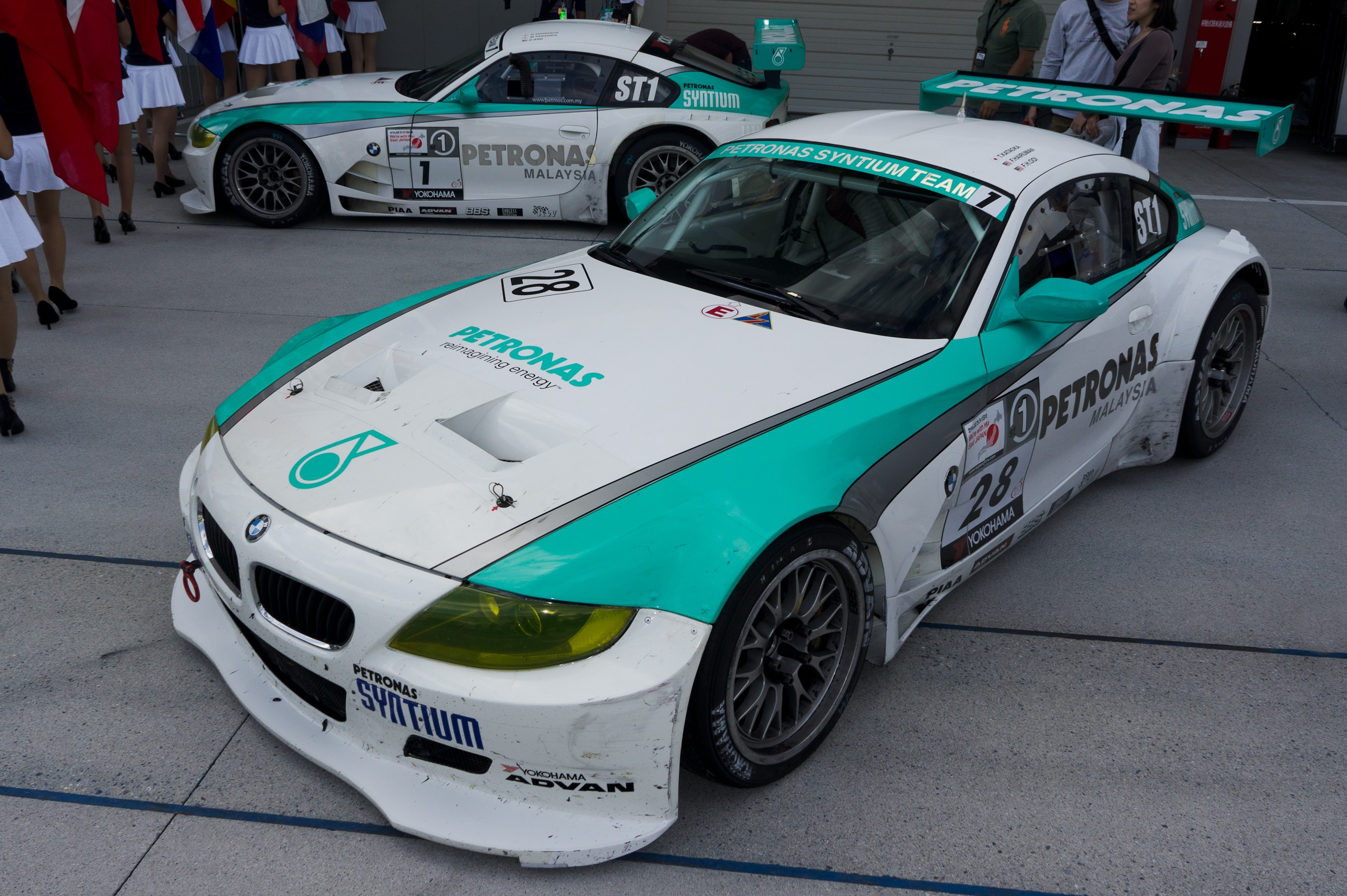 Super Taikyu 2011 Rd.4 Suzuka: BMW Z4 M Coupe (Petronas Syntium Team)